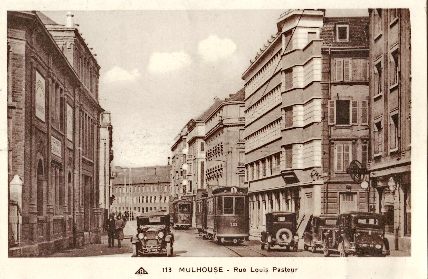 Carte postale ancienne éditée par la Compagnie des arts photomécaniques (CAP) à Strasbourg-Schiltigheim, n°113 :MULHOUSE - Rue Louis Pasteur